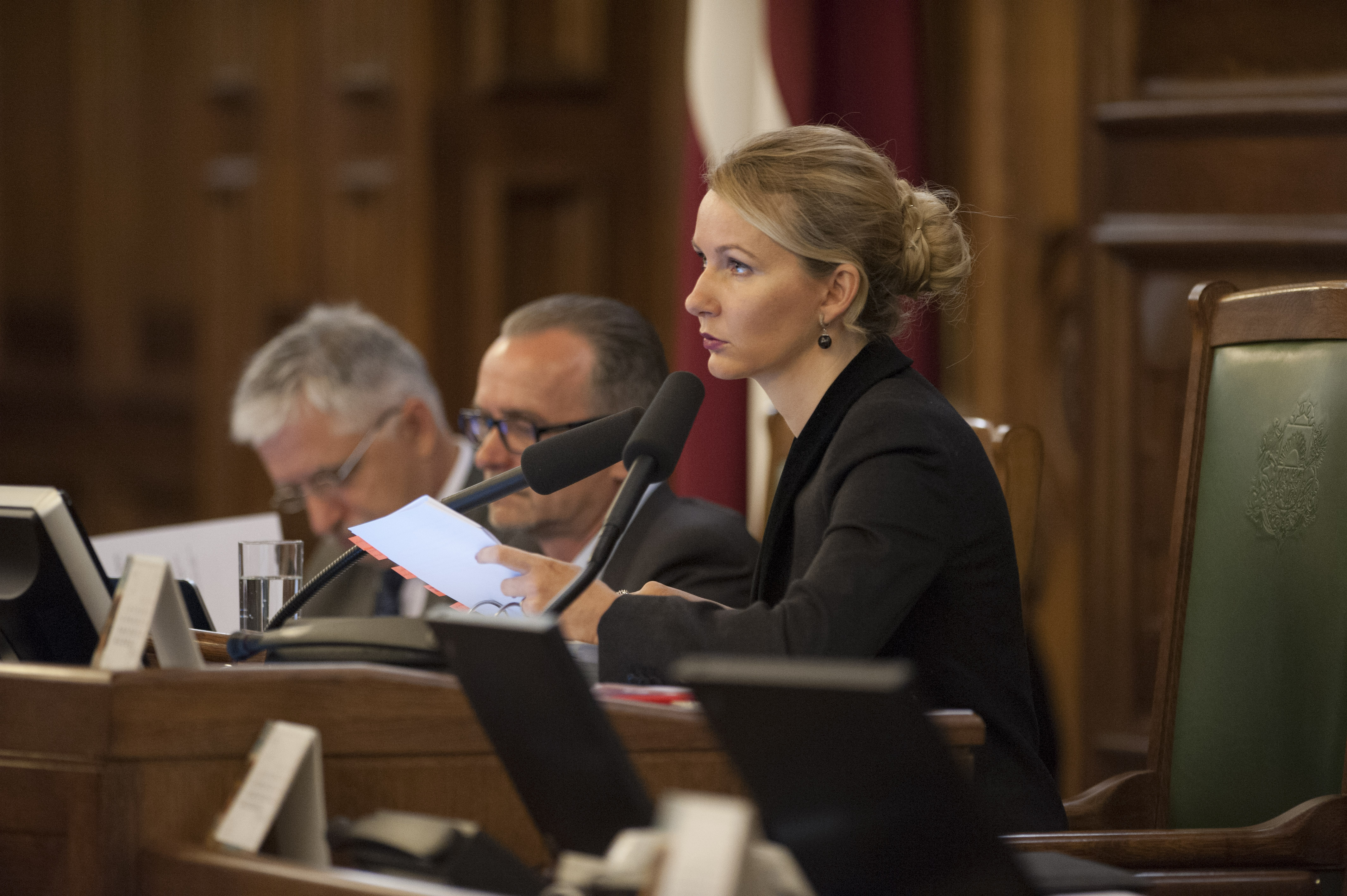 Inese Lībiņa-Egnere